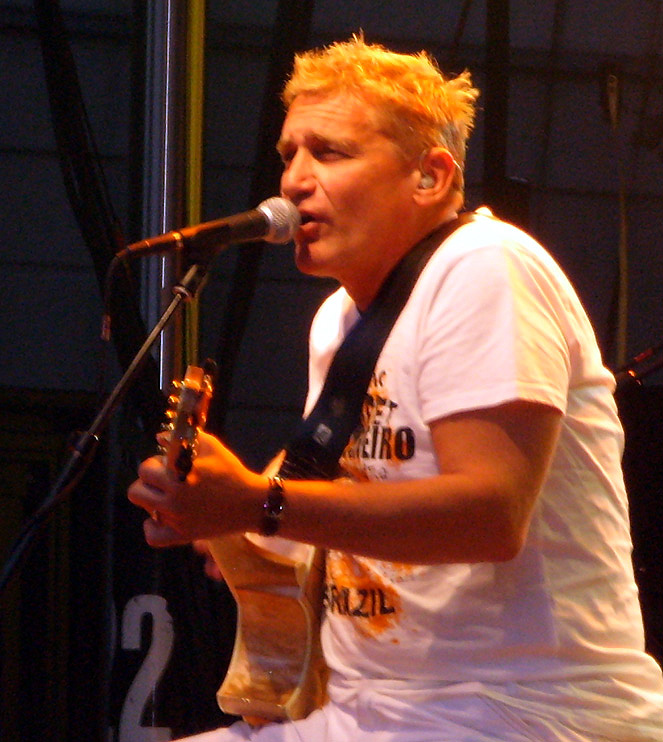 Rainhard Fendrich live in Imst (Austria 3 Konzert).